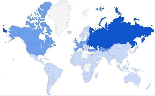 Популярность Мейл.ру в мире.